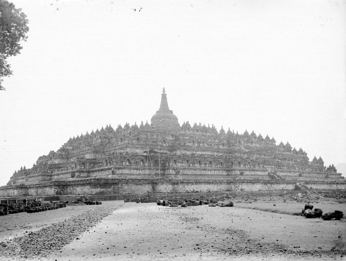 Negatief. De Borobudur